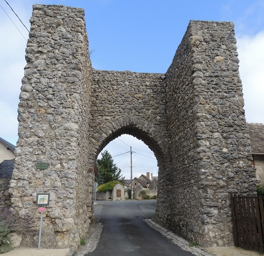 Porte fortifiée de Rillé deux énormes piles de chaque côté de la route et une arcade brisée entre les deux sous laquelle on devine le logement de la herse, construction de petits moellons. Petit portillon en bois fixé dessus à droite et possiblement un puits ou calvaire au second plan